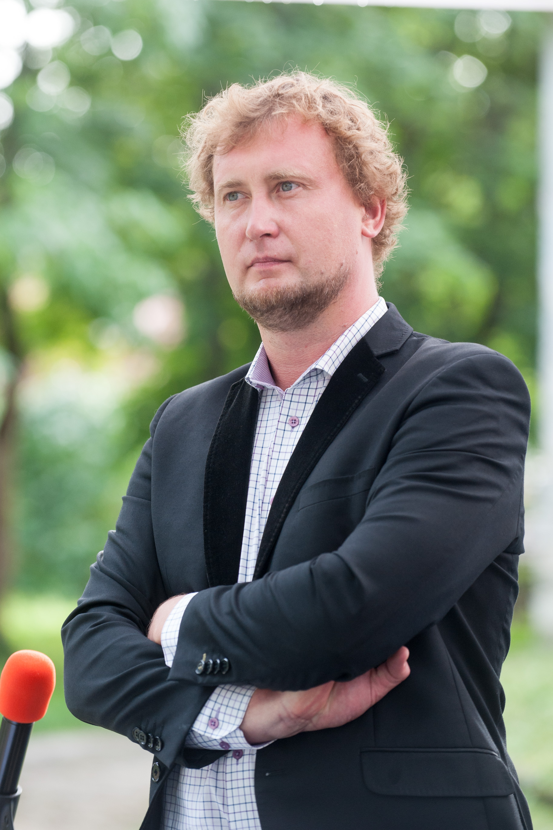 Jaanus Rohumaa